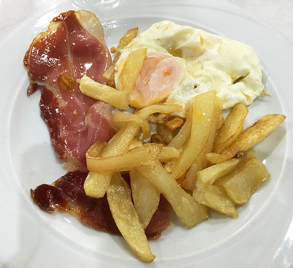 Huevos con patatas y jamón